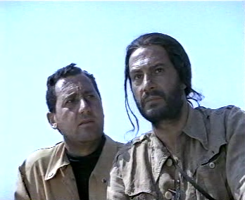 screenshot from the Italian film Riusciranno i nostri eroi a ritrovare l'amico misteriosamente scomparso in Africa? (1968)